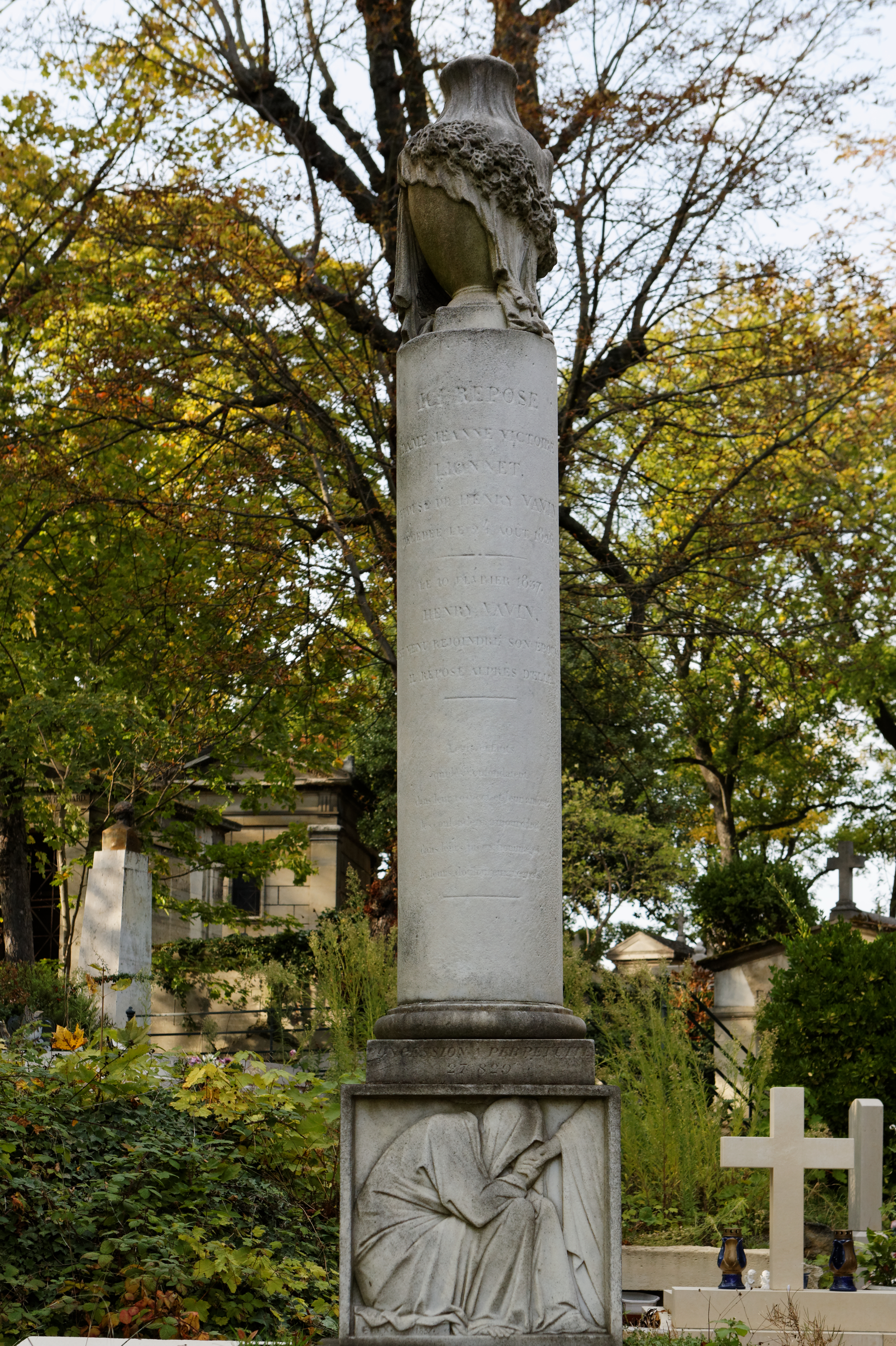 Bas-relief d'Antoine Étex représentant une pleureuse retenant la main de la défunte.